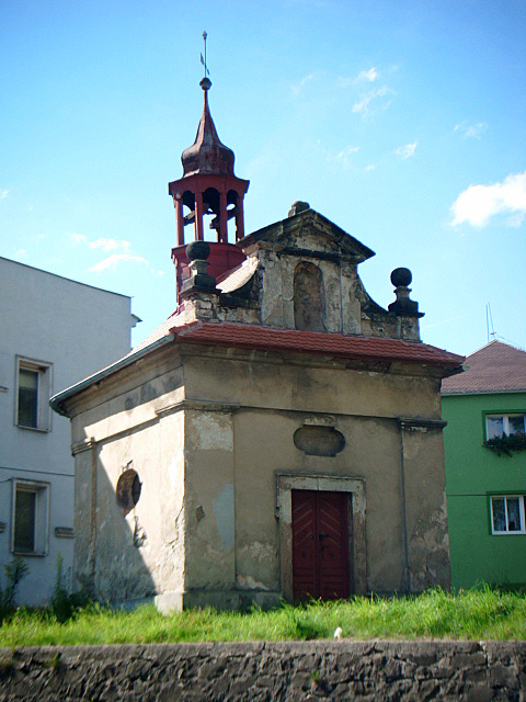 Kaple Nejsvětější Trojice (Benešov nad Ploučnicí), Benešov nad Ploučnicí